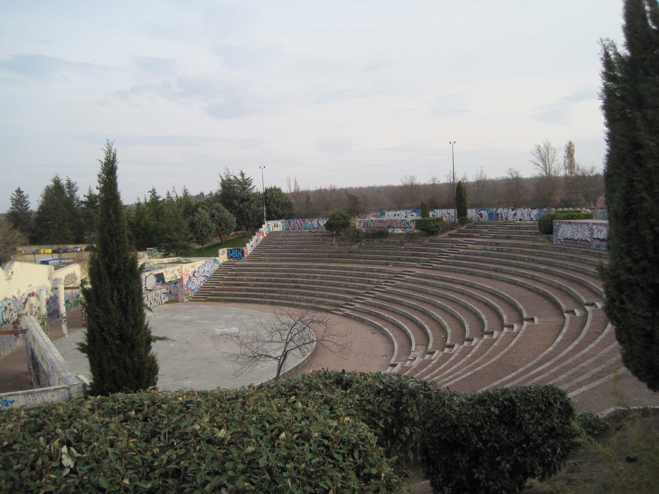 Auditorio del parque de La Manguilla, en El Escorial (Madrid, España).